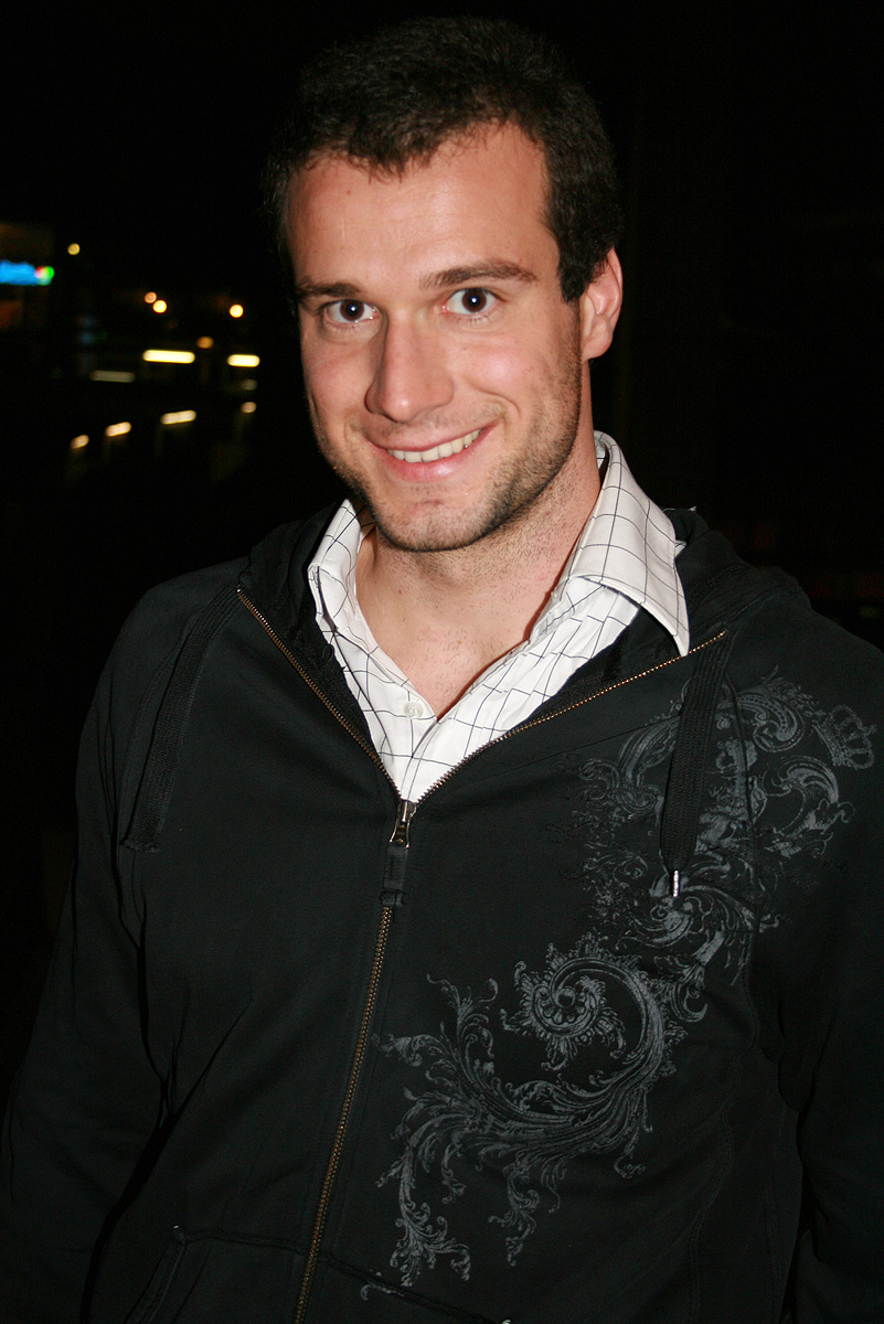 Der österreichische Schwimmer Markus Rogan als Gast bei der Verleihung der Amadeus Austrian Music Award in Wien